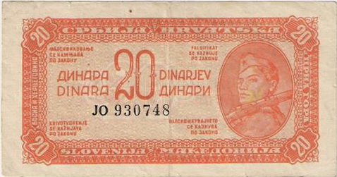 20 Yugoslav dinars note (1944 dinar)